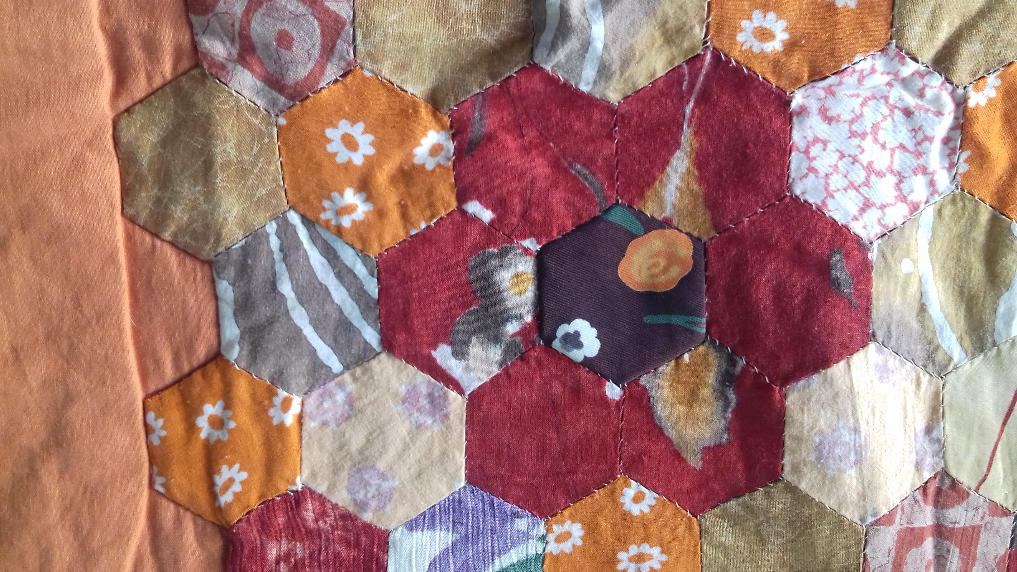 Style de patchwork traditionnel de l'île de La Réunion